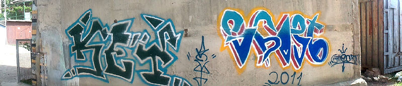 Քեյի գրաֆիտի